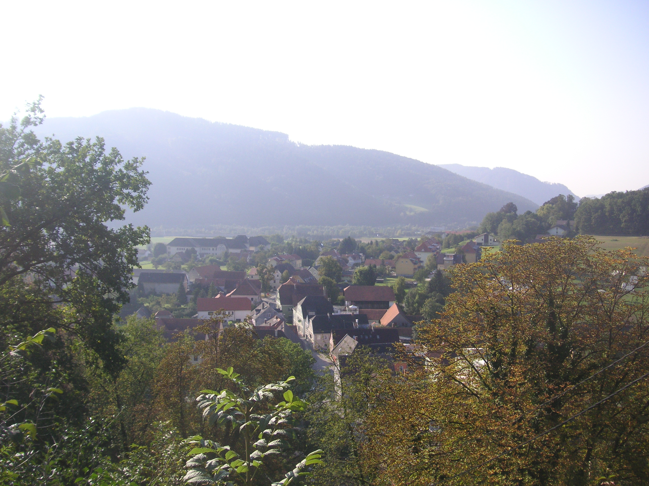 Deutschfeistritz vom Kirchberg aus gesehen.